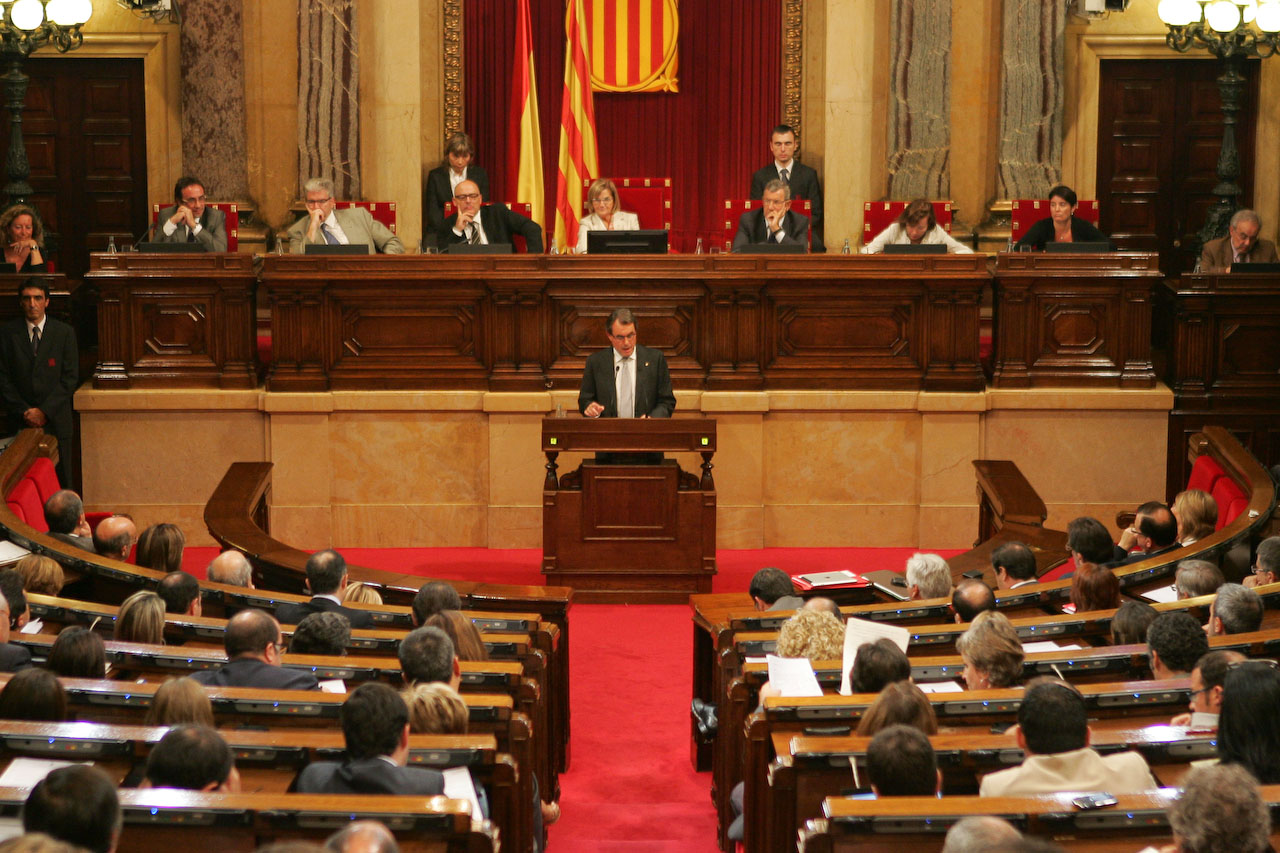 Foto: Job Vermeulen